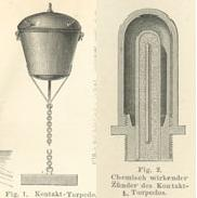 Seemine und Zünder etwa 1880, seinerzeit noch als defensiver oder Kontakt-Torpedo bezeichnet, Quelle Meyers Konversationslexikon 1888-1889